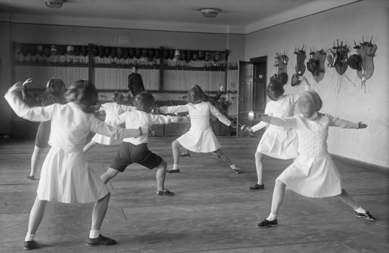 Aus der Berliner Damen-Fecht-Akademie! Trainingskampf der Damen im Saal der Berliner Fecht-Akademie.